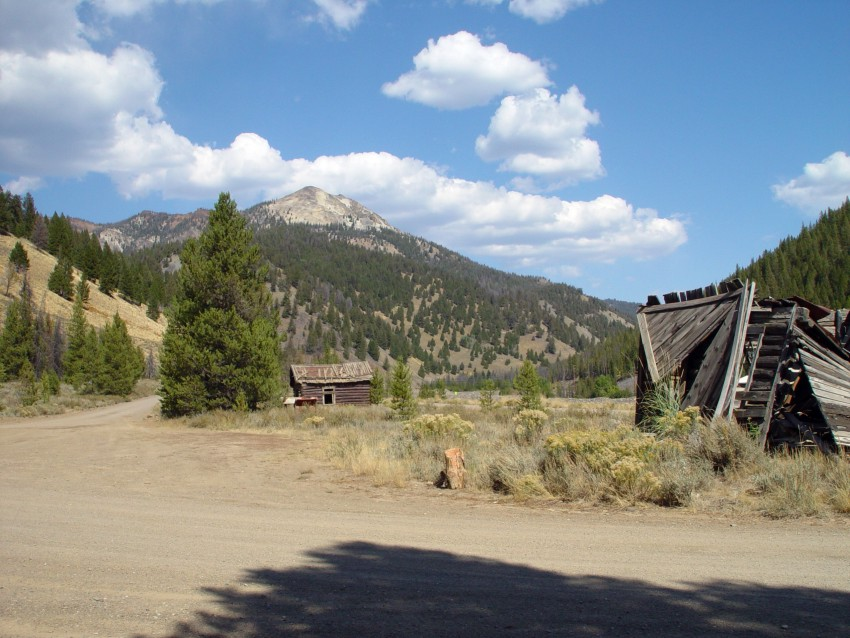 Bonanza Ghost town 17-9-08